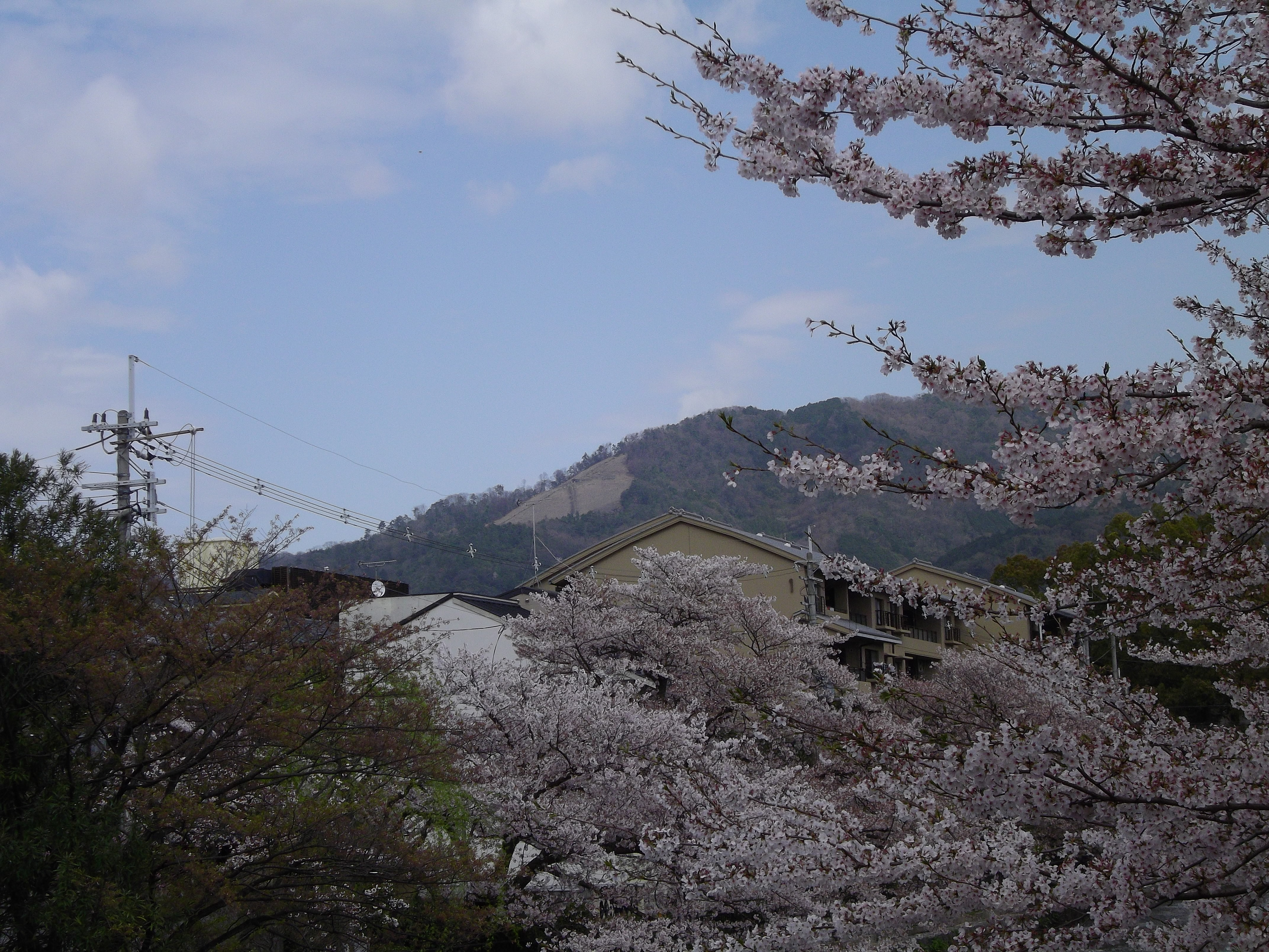 大文字山。岡崎の疎水縁より。大の字がそっぽを向いている。